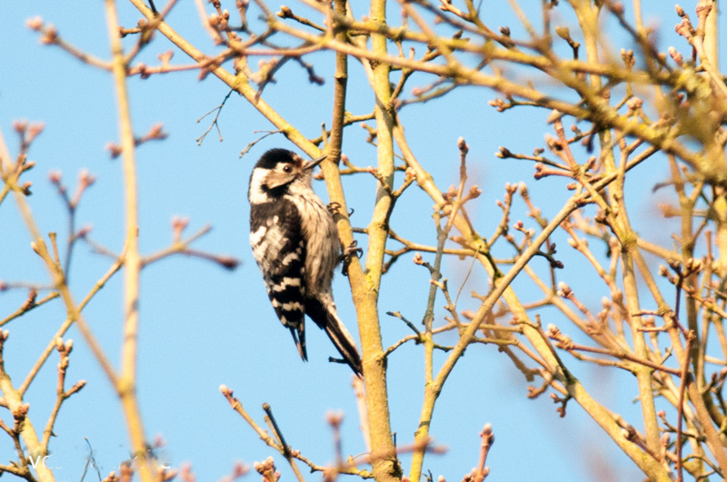 Kleine Bonte Specht